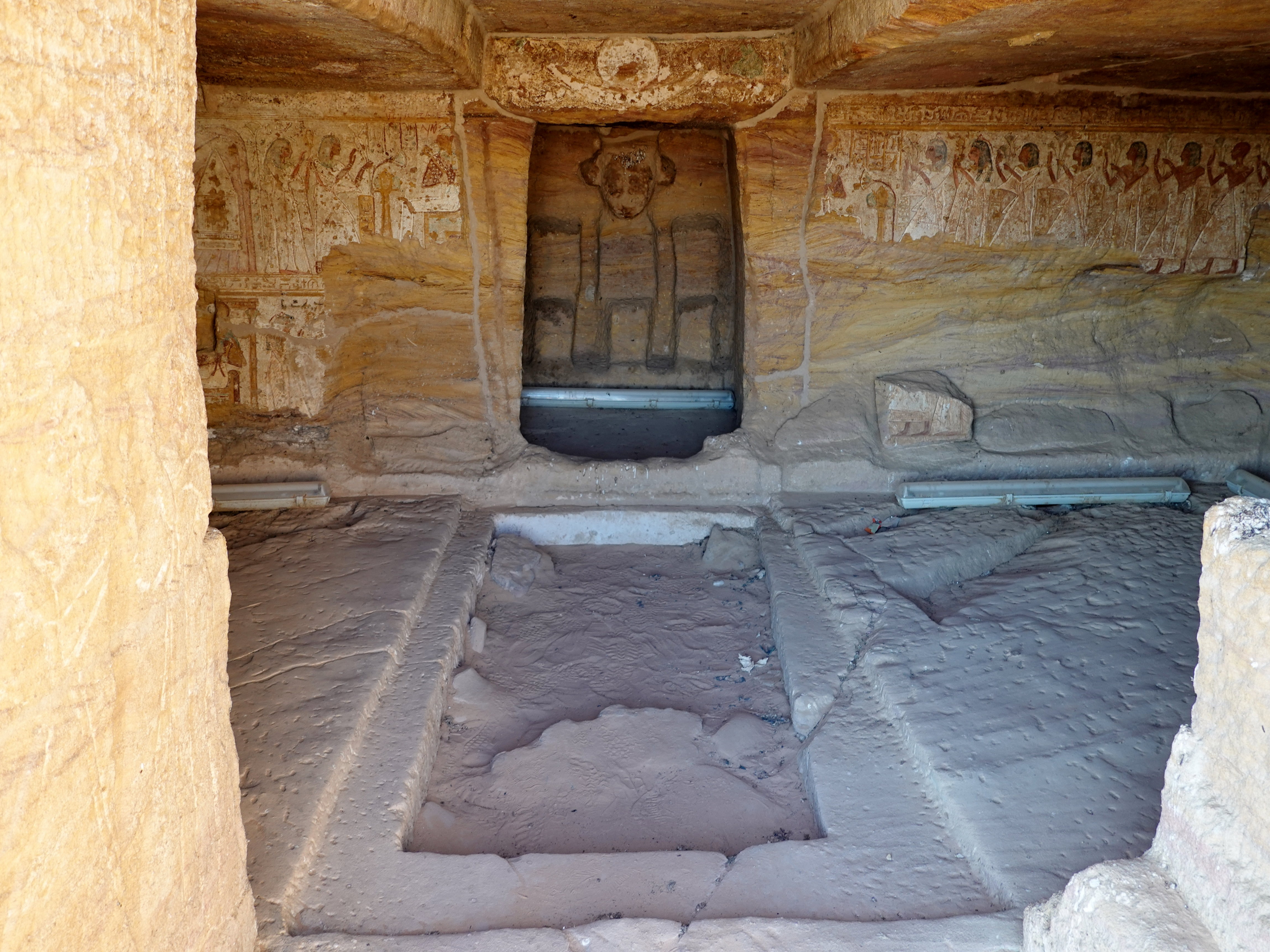 Grab des Pennut am Nassersee, Ägypten